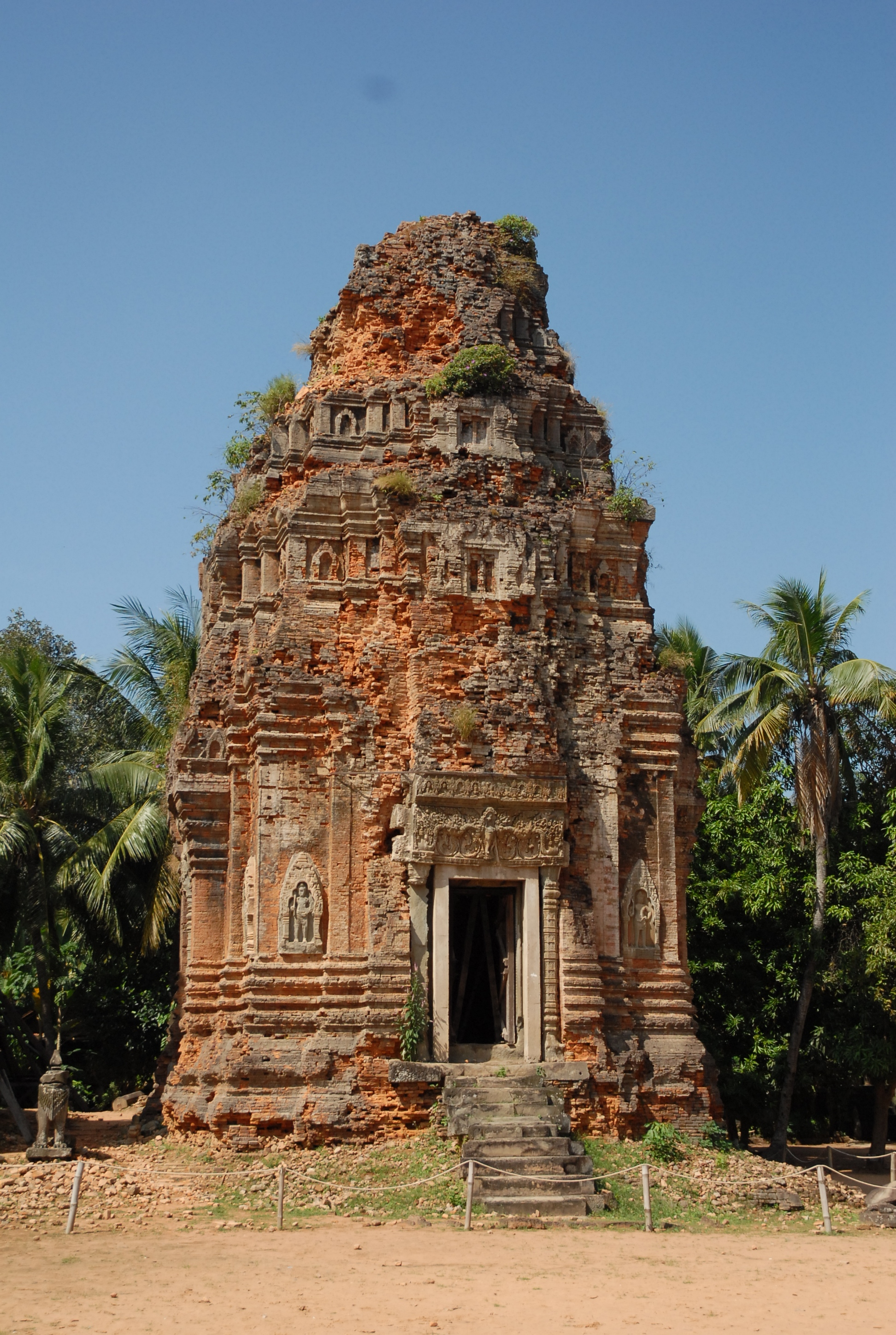 Cambodge, site archéologique d'Angkor (zone de Rolûos), temple de Lolei (fin du IXe siècle)